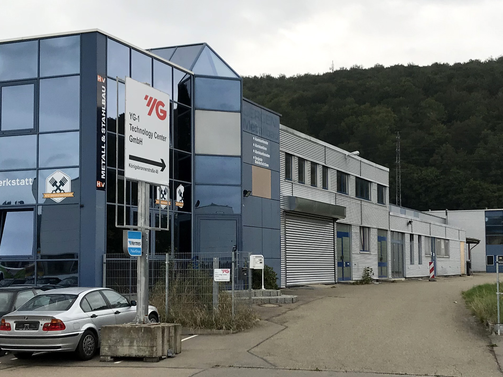 YG-1 - Übergangsweise Fertigung für Zerspanungswerkzeuge in der Königsbronnerstraße 48 in Heidenheim-Schnaitheim